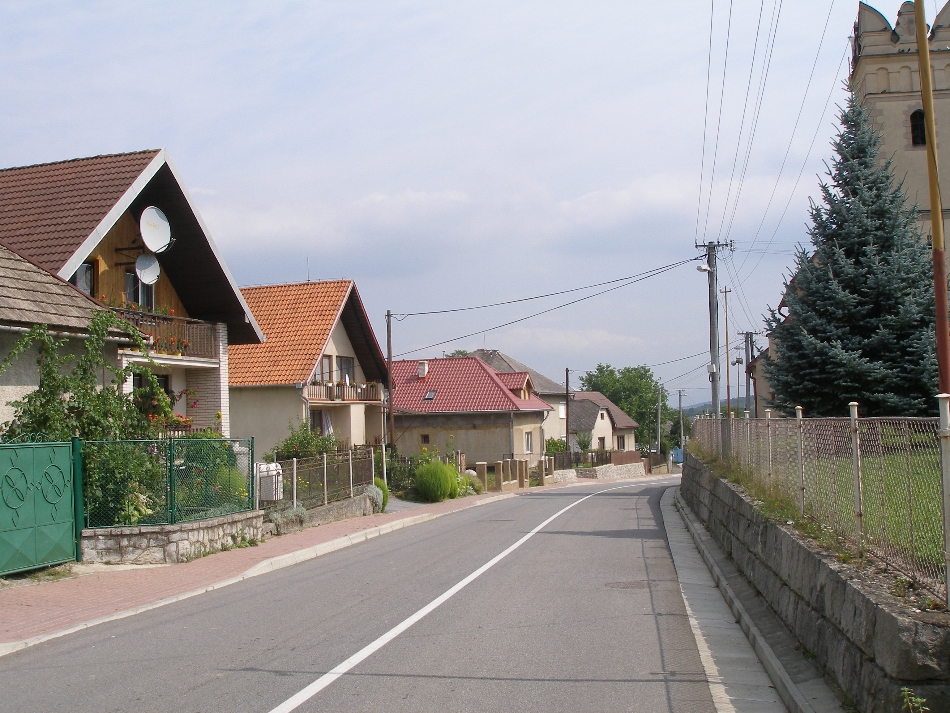 Šarišská obec Chmiňany